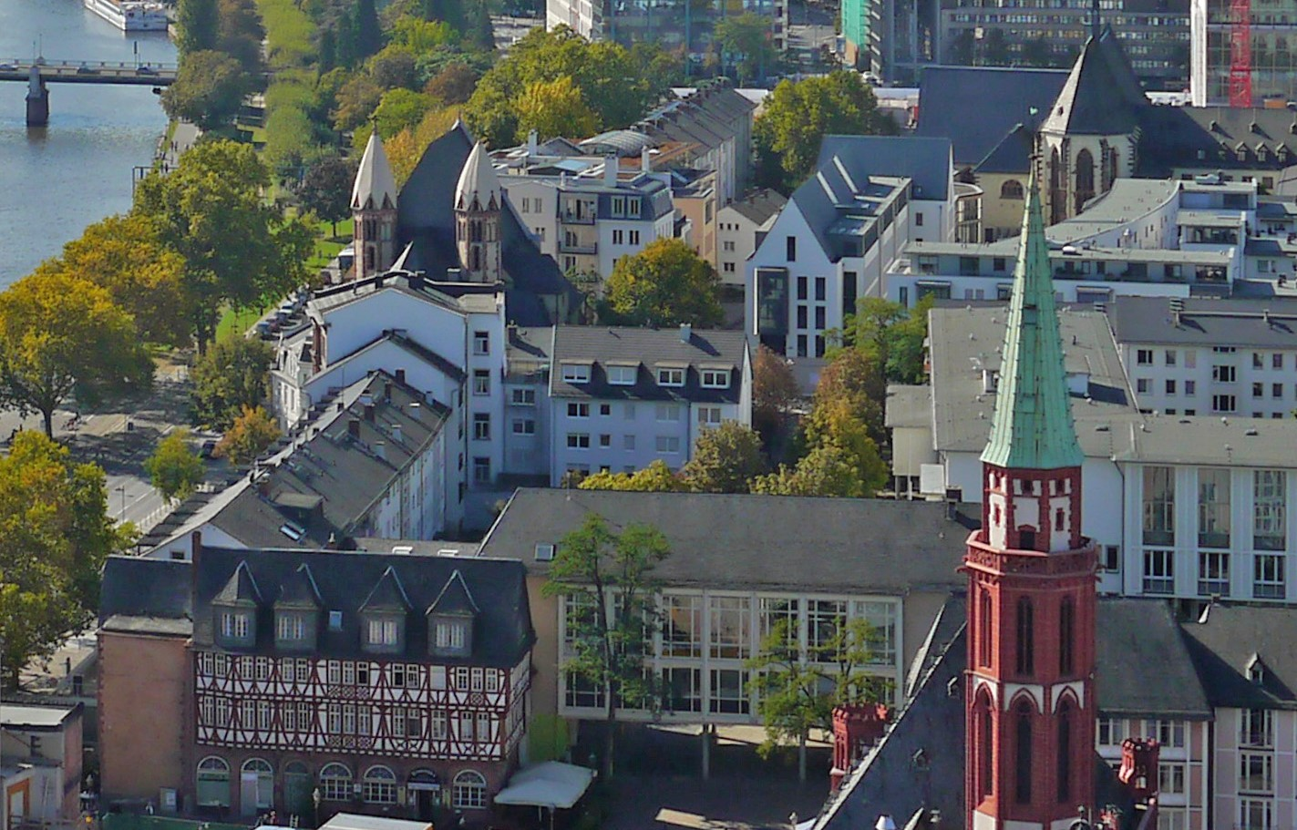 Gemeindehaus der ev. Paulsgemeinde vor dem Umbau zur Evangelischen Akademie Frankfurt, photographiert vom Domturm